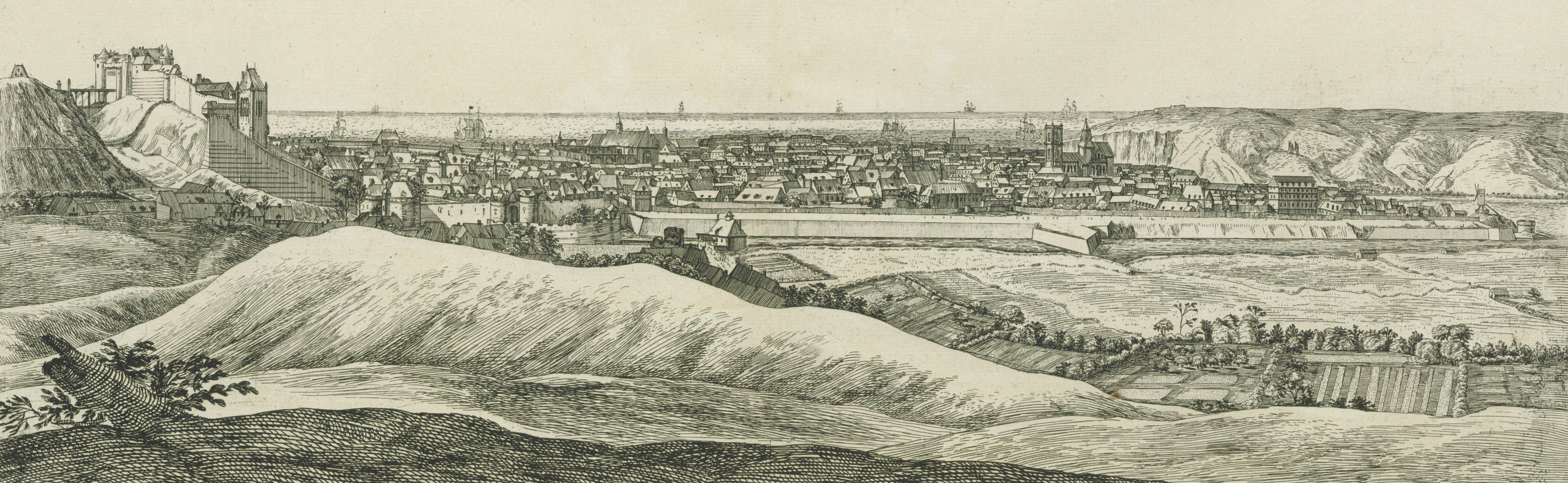 Profil de la ville de Dieppe.